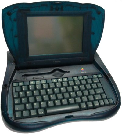 Taken by Ryan Schultz.